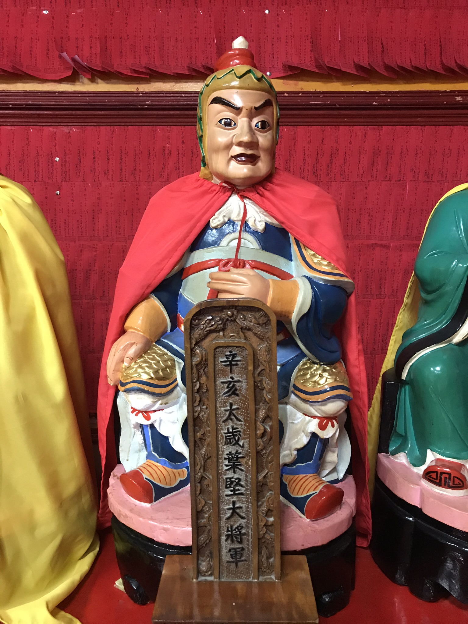 麻豆代天府辛亥太歲葉堅大將軍神像